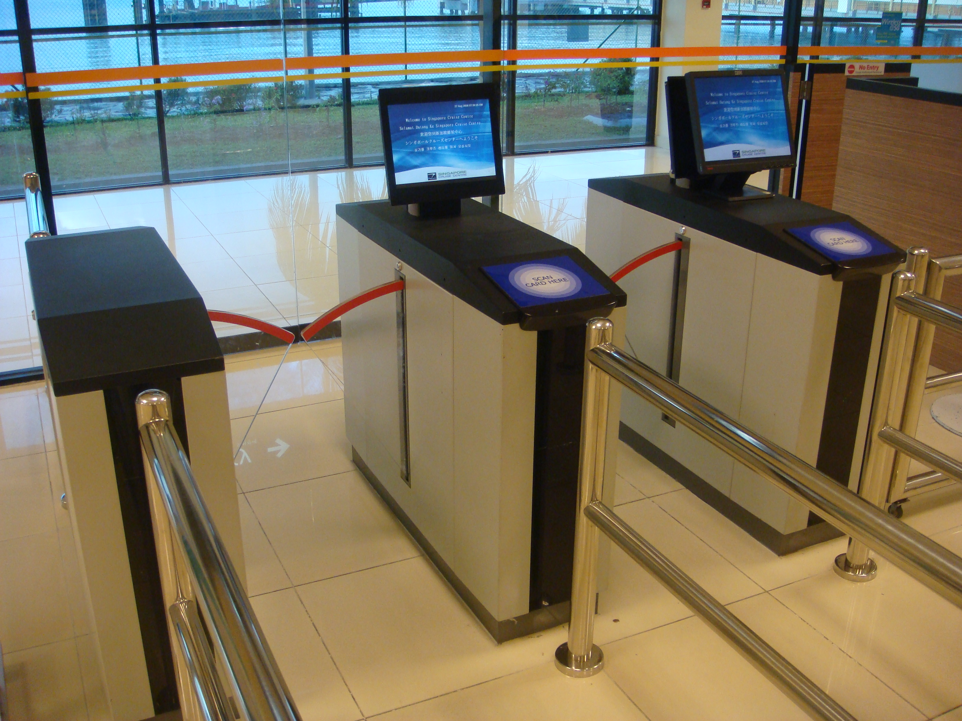 タナ・メラ・フェリー・ターミナル 桟橋への出口に設置された自動化ゲート